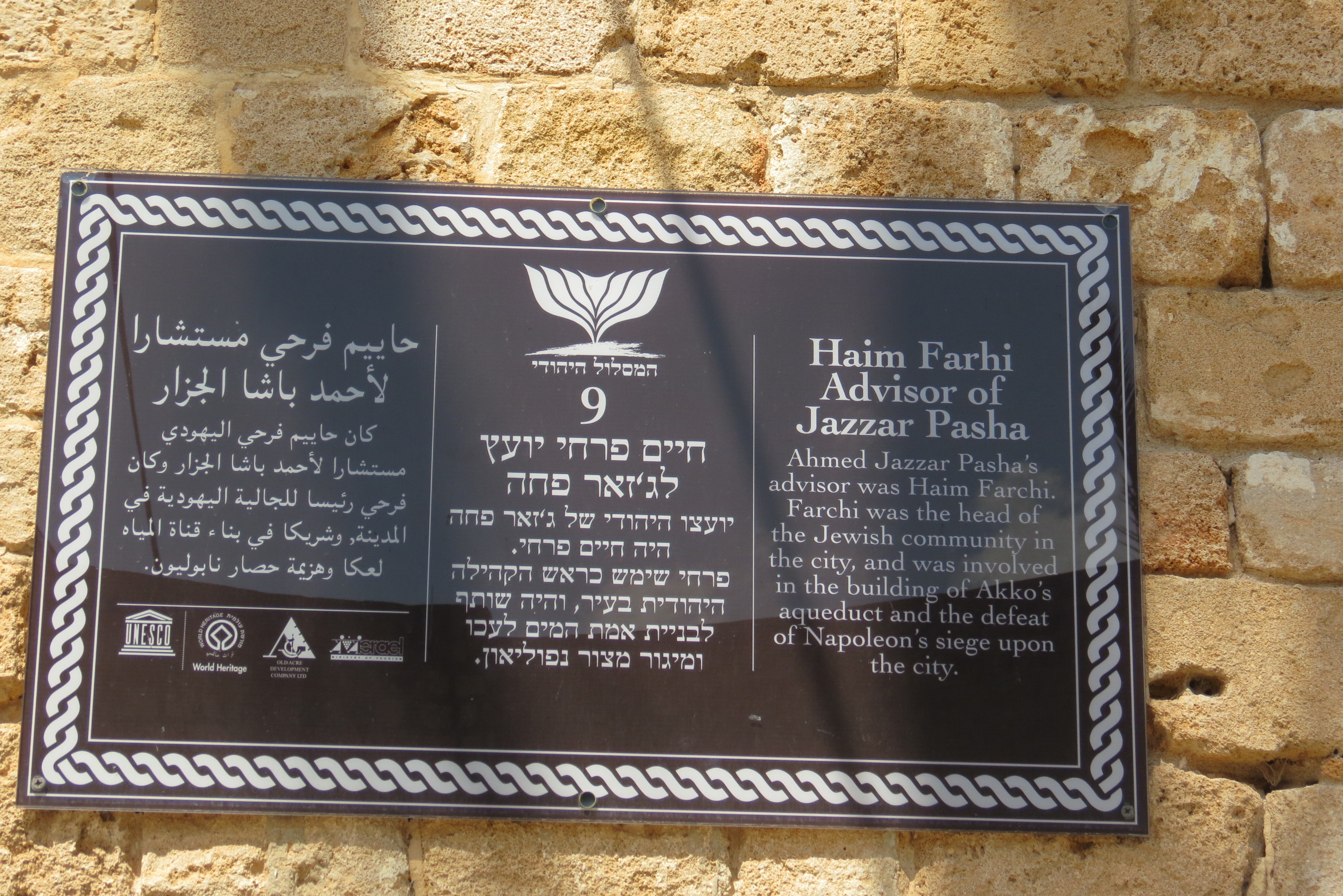 Tour of Acco Acre Israel עכו